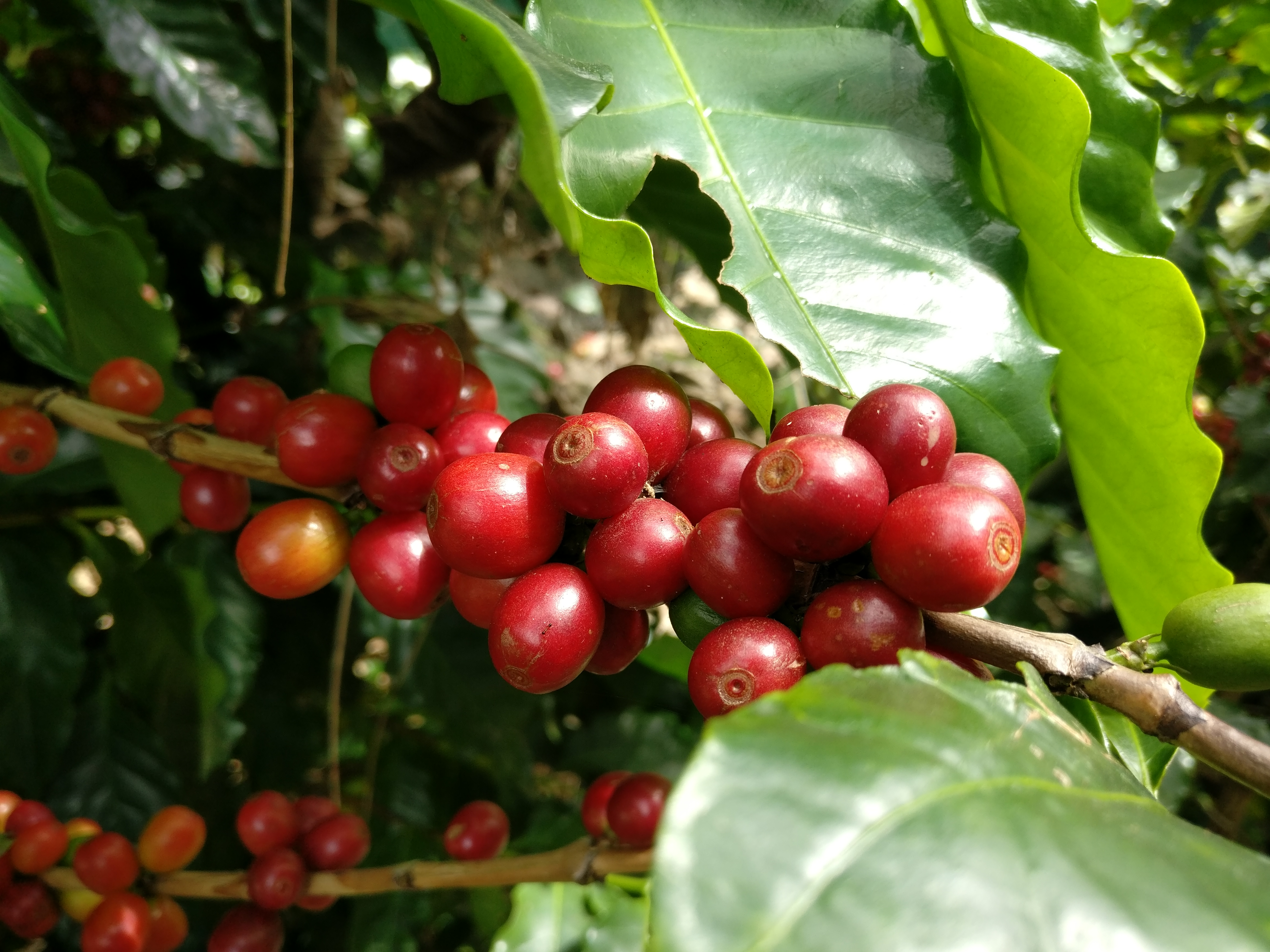 El café de Costa Rica es reconocido mundialmente por su calidad. El 27 de enero de 2020 fue declarado símbolo patrio.